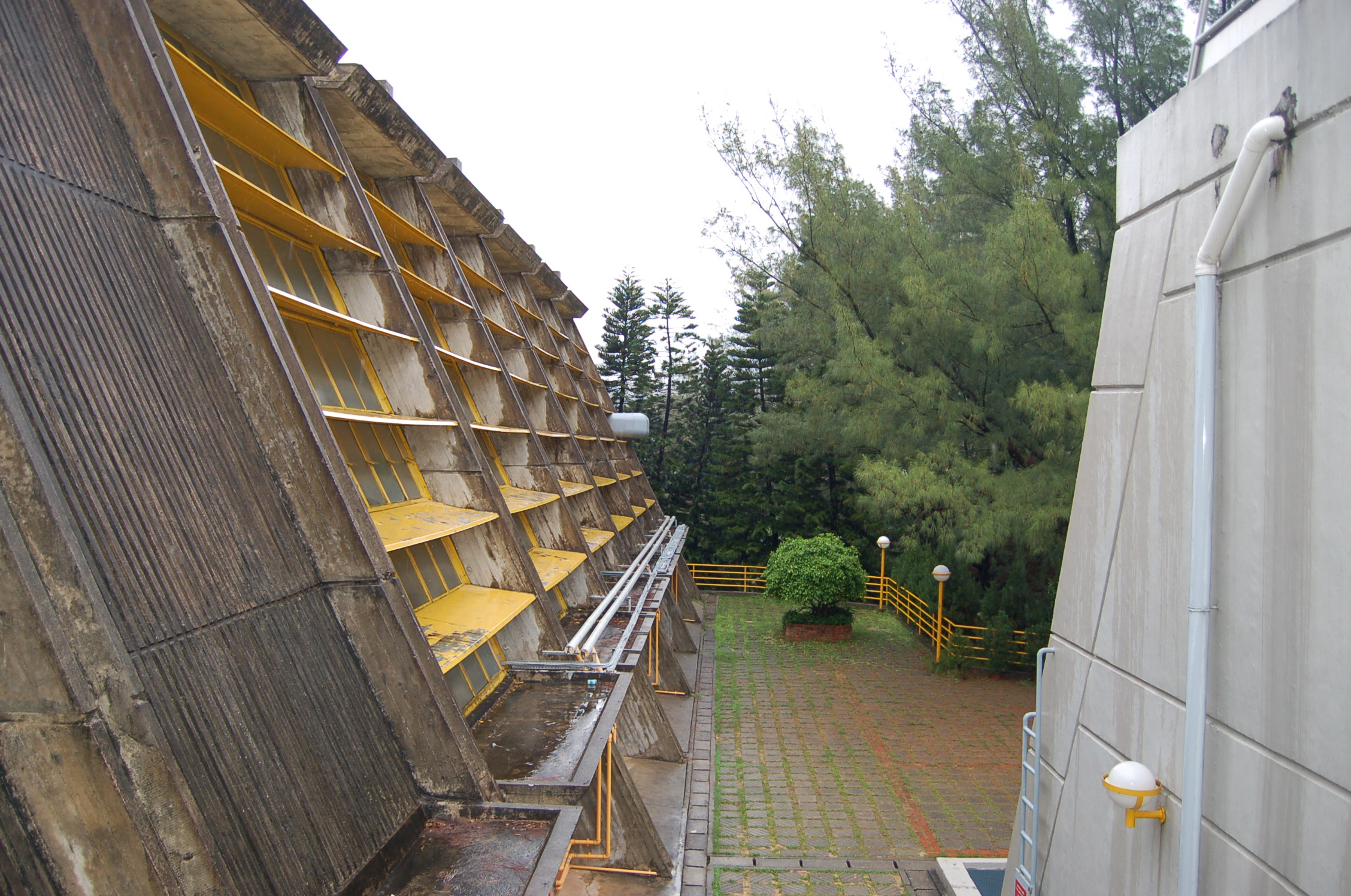 Tang Shiu Kin Hall